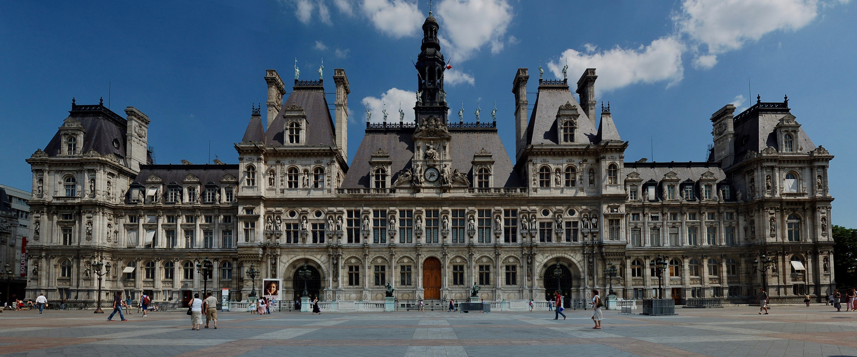 Hôtel de ville de Paris. Vue de la façade ouest. Montage panoramique équirectangulaire effectué à partir de 15 photographies (voir les métadonnées EXIF et IPTC de l'image pour plus d'informations).